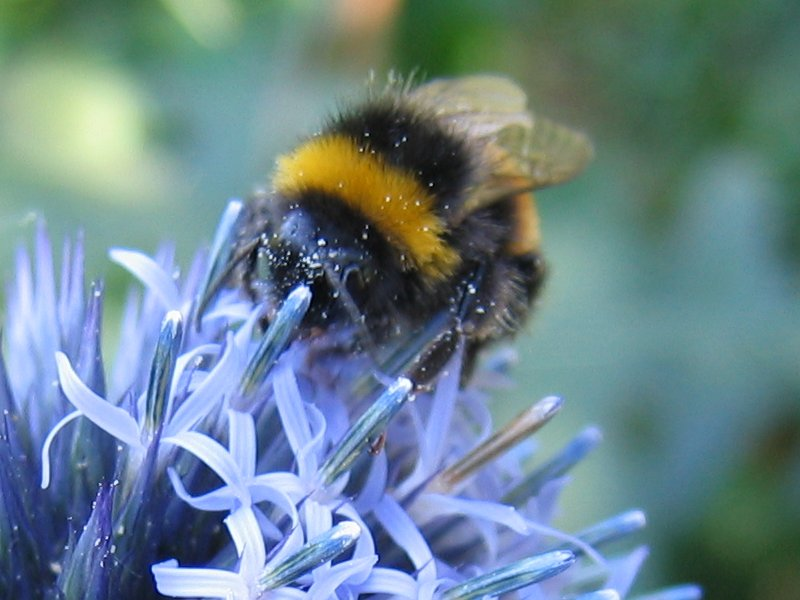 Helle Erdhummel Bombus lucorum auf einer Kugeldistel Echinops ritro, Rostock